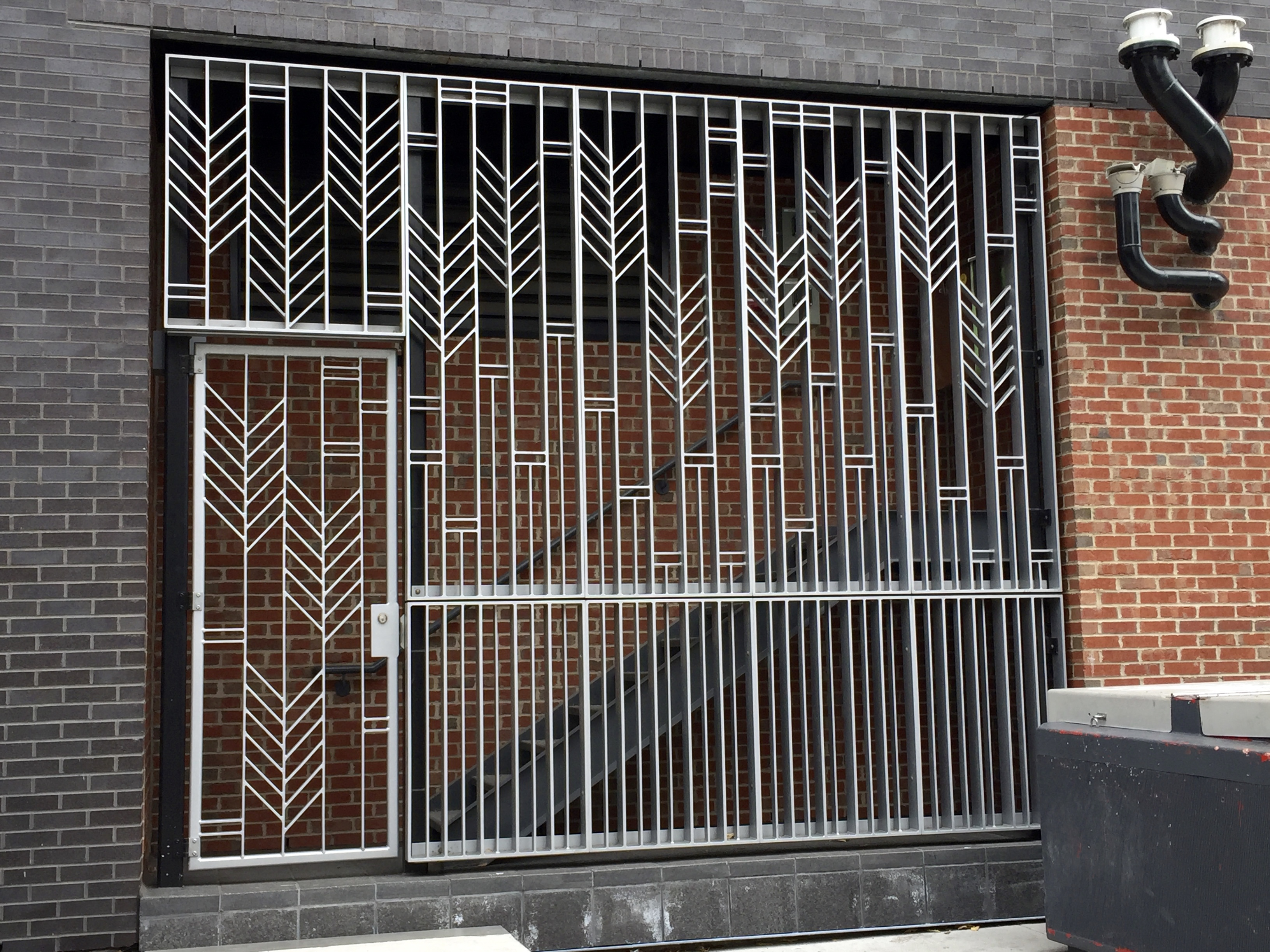 Grille sculpturale a l’extérieur de la station Snowdon du métro de Montréal.